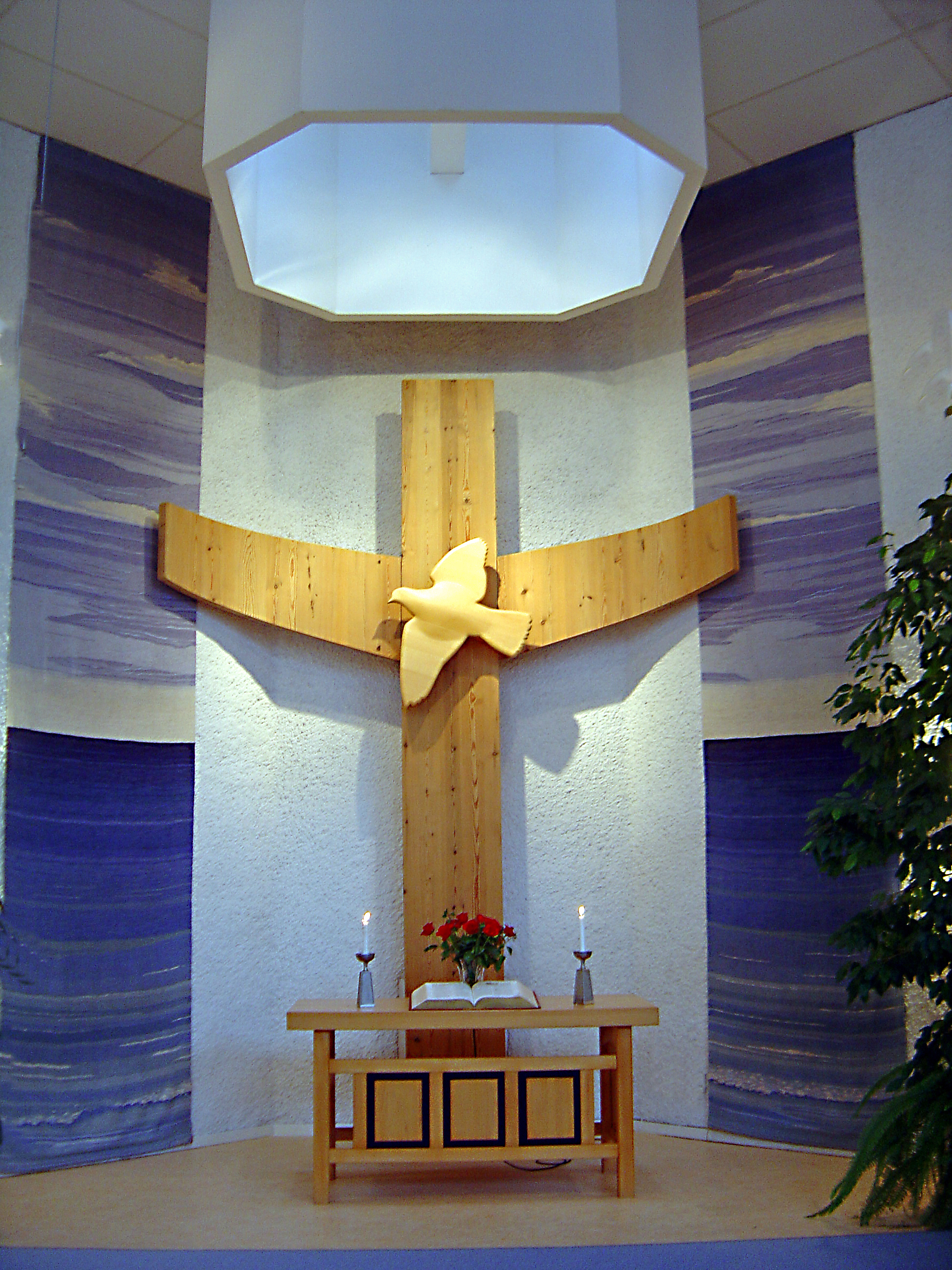 Västerportkyrkan i Kalmar, interiör från kyrkans fondparti. Bilden är tagen av mig själv